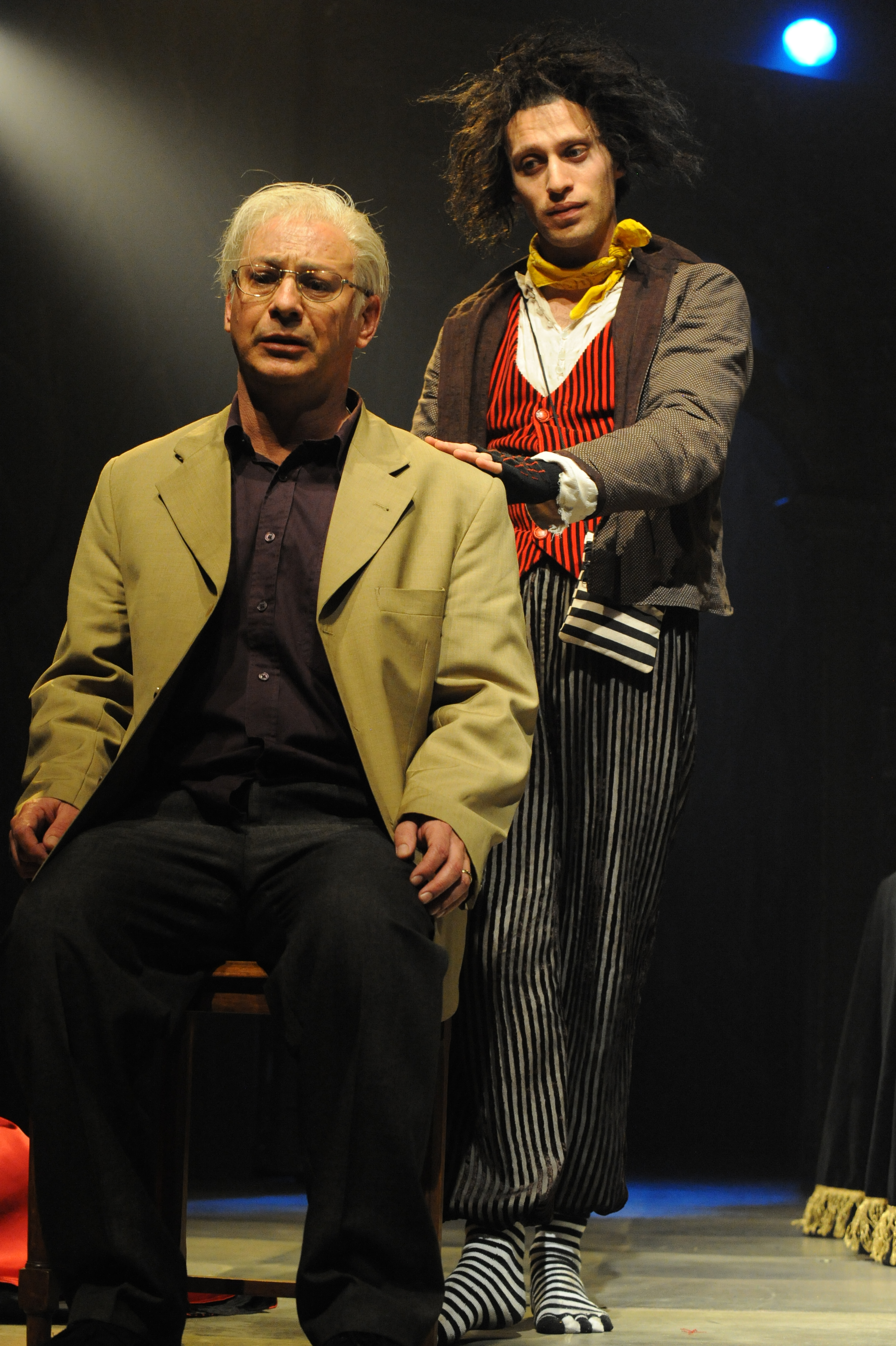 ויטלי פרידלנד וארז שפריר בהצגה "אהובת הדרקון", מאת ובבימויו של מיקי גורביץ', תיאטרון החאן